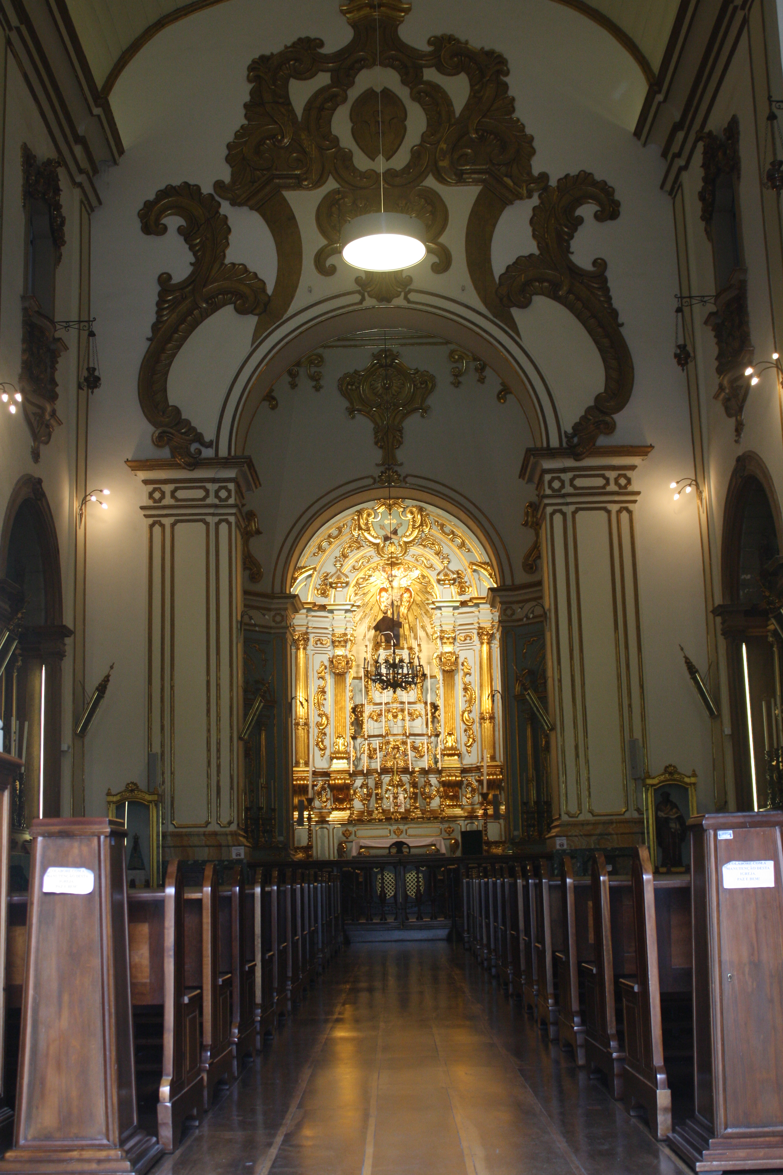 Visão de entrada da Igreja das Chagas do Seráfico Pai São Francisco, em São Paulo (SP), Brasil